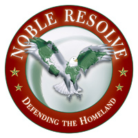 Noble Resolve logo